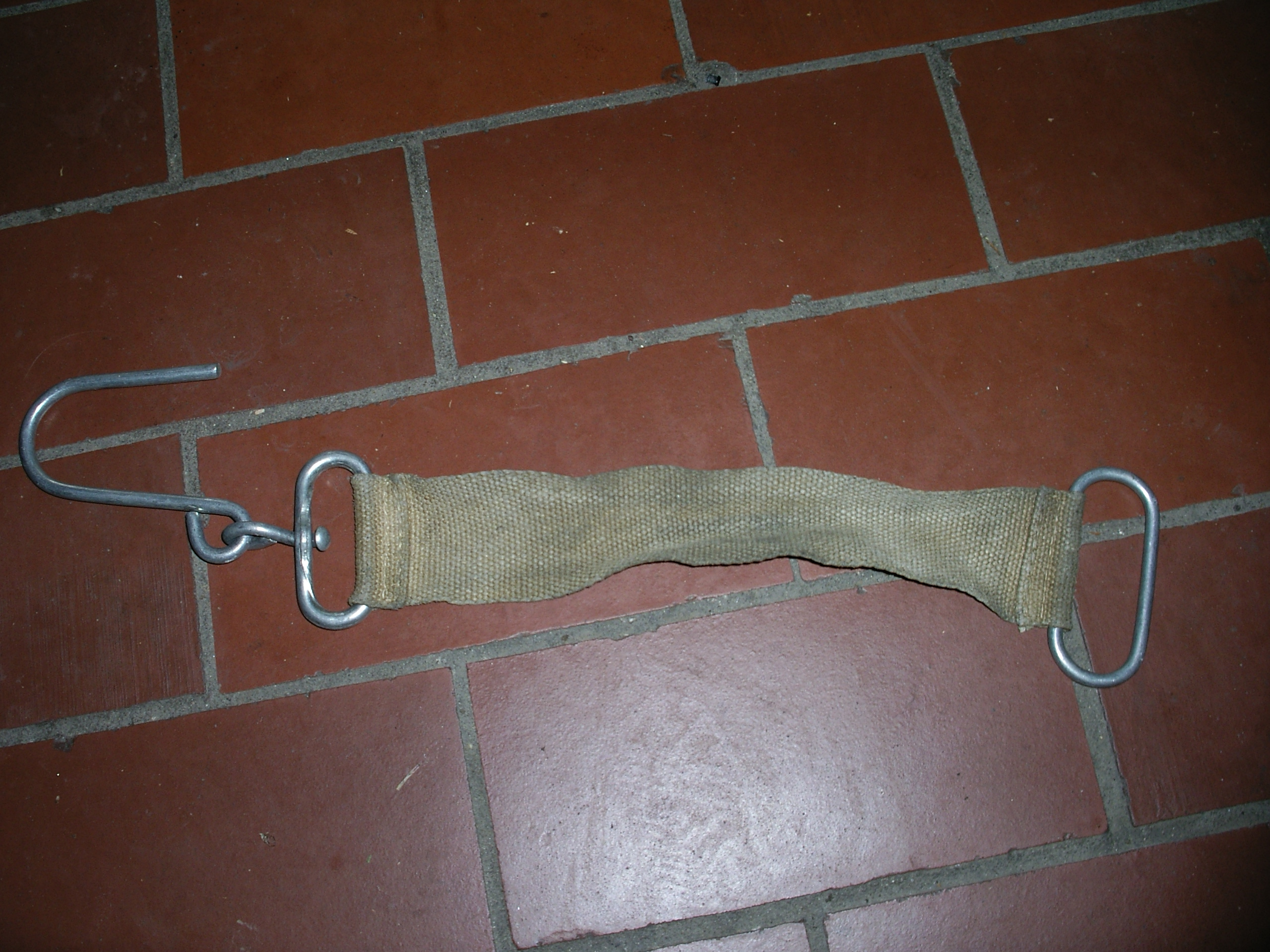 Schlauchhalter